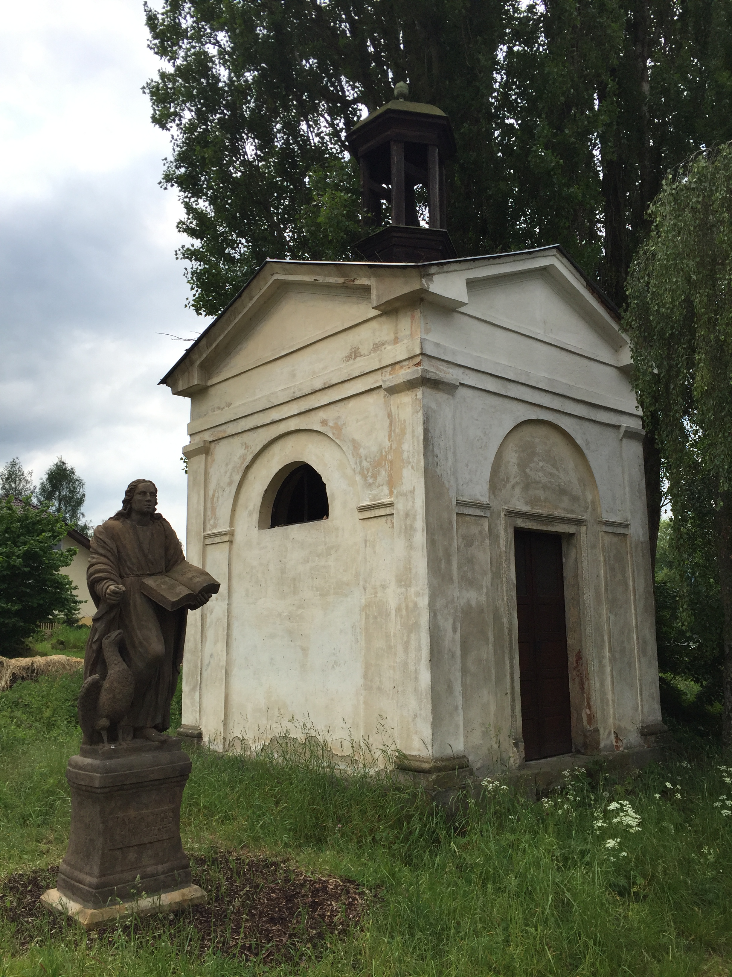 Kaple, Děčín-Křešice